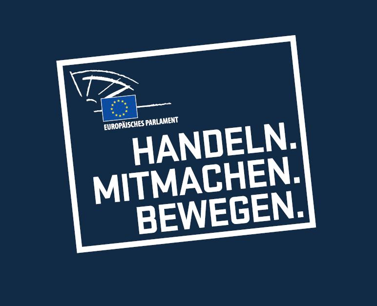 Deutschsprachiges Logo zur "Handeln. Mitmachen. Bewegen."-Kampagne des Europaparlaments anlässlich der Europawahlen 2014.